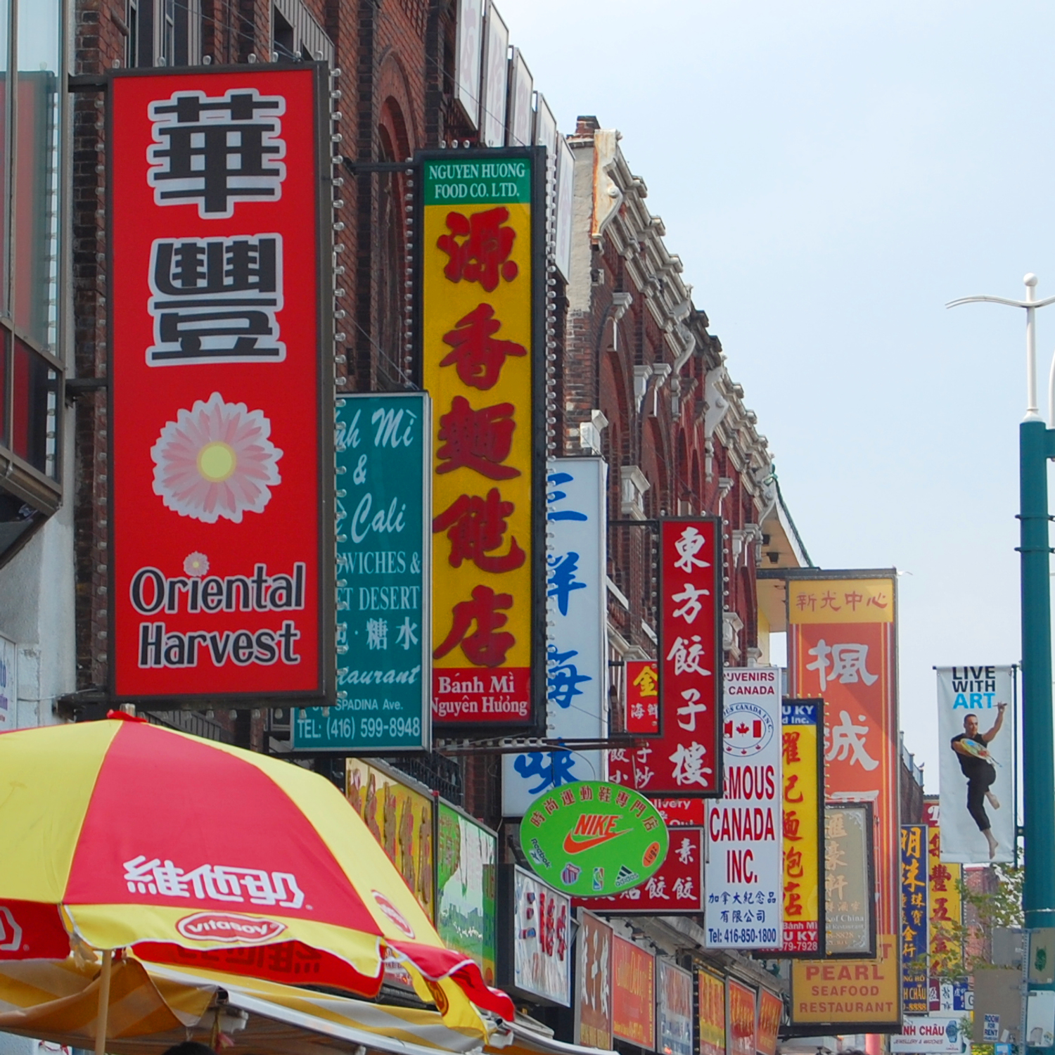 Spadina Avenue, Toronto, Canada.